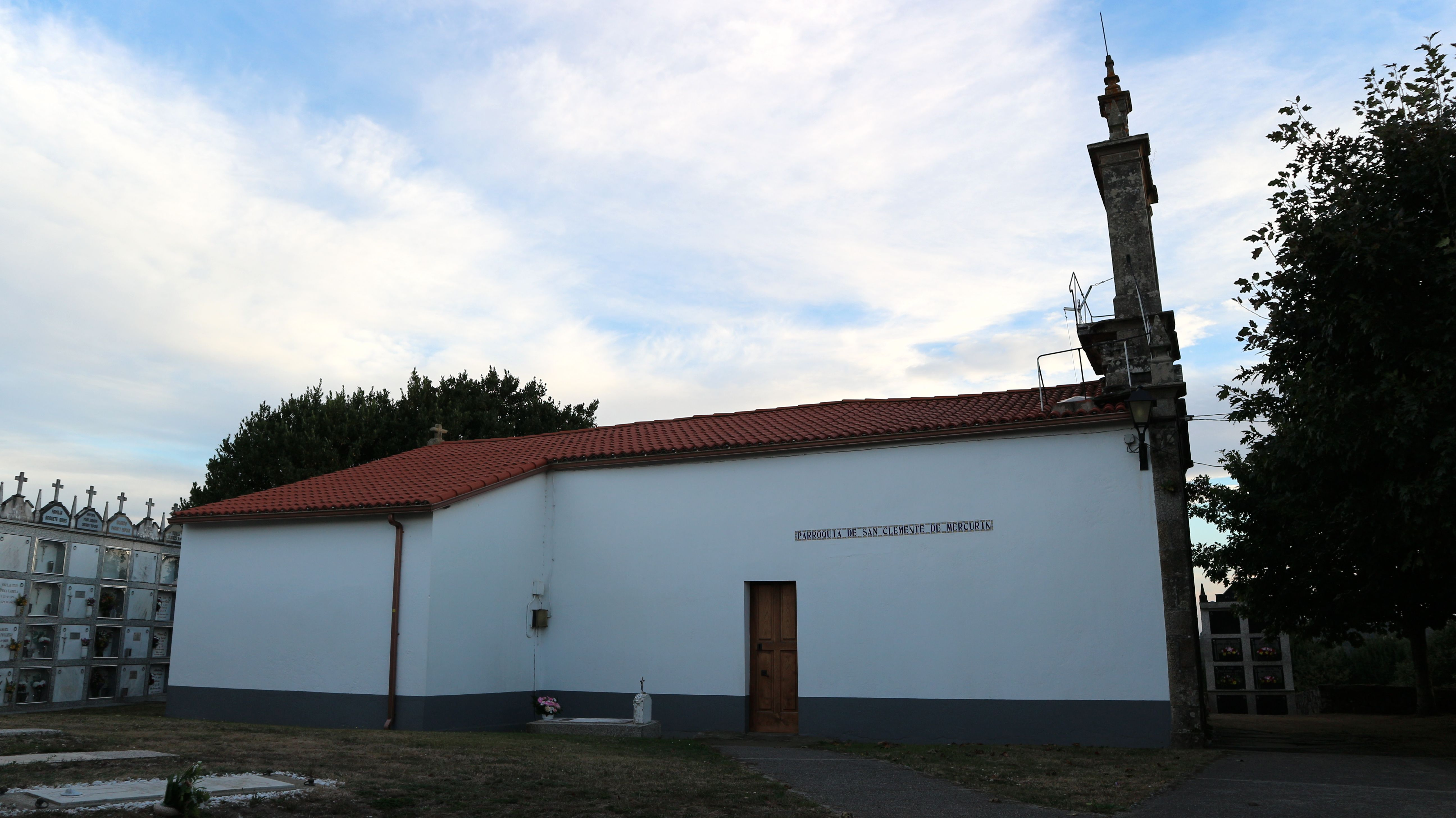 Igrexa de San Clemente de Mercurín. Mercurín, Ordes.